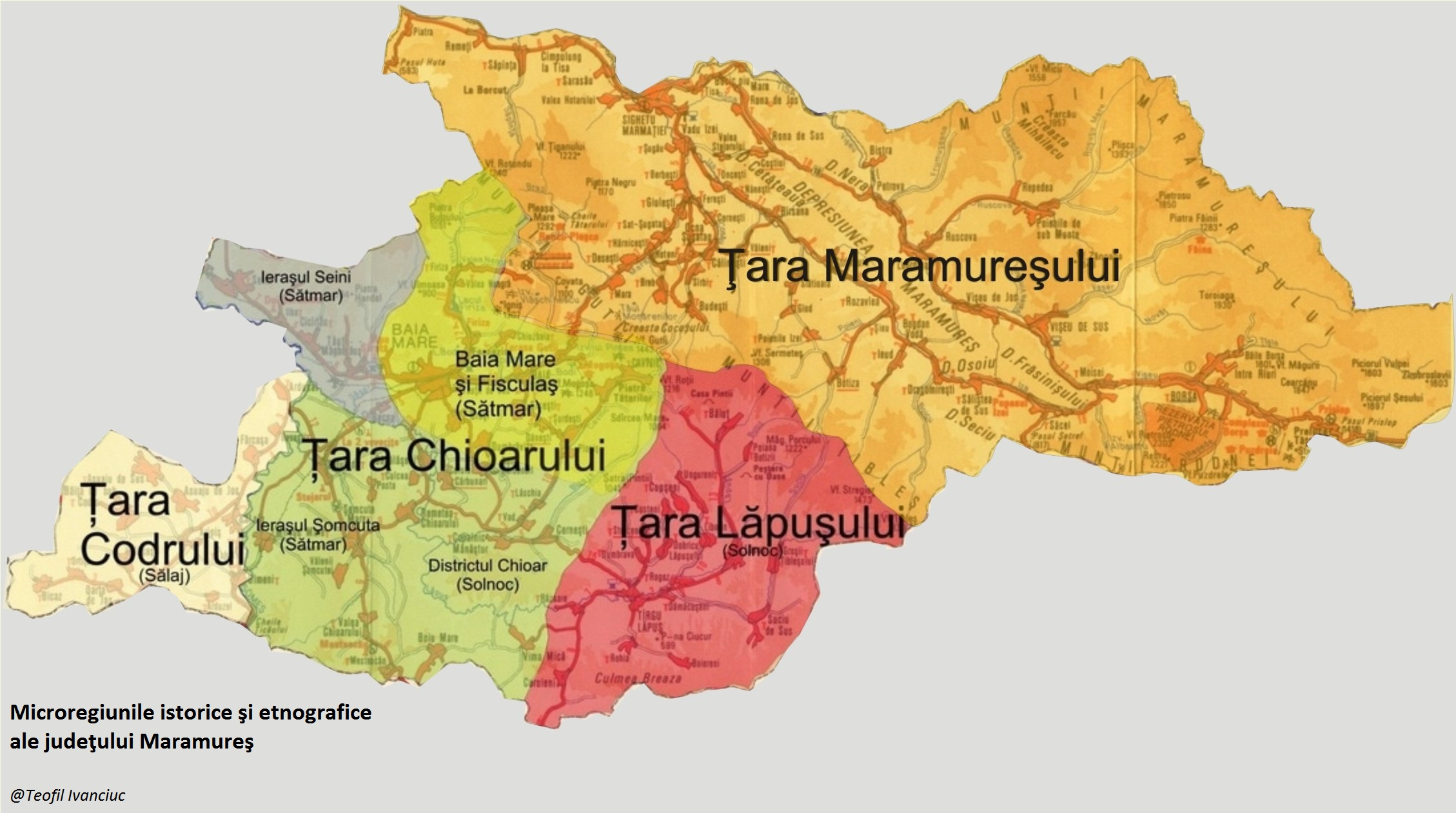 Harta prezintă limitele celor patru regiuni istorico-etnografice care compun actualul judeţ Maramureş